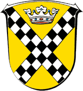 Wappen von Elbtal (Hessen)